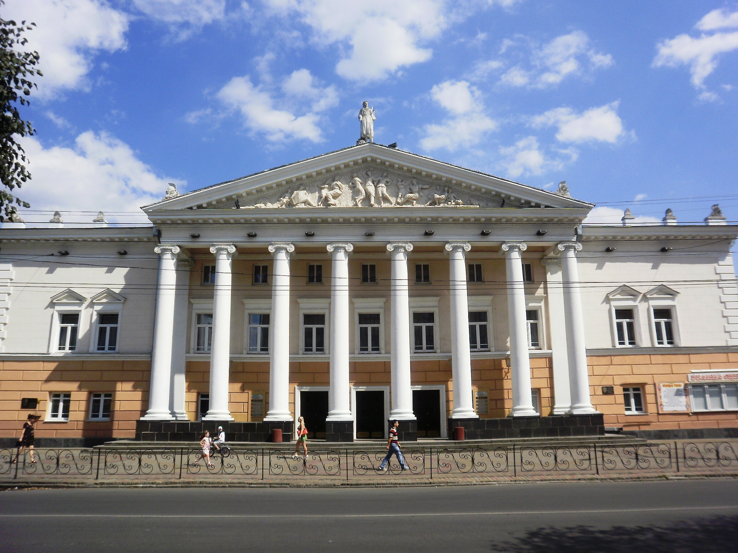 Музично-драматичний театр ім. М. К. Садовського, Вінниця, вул. Театральна, 13